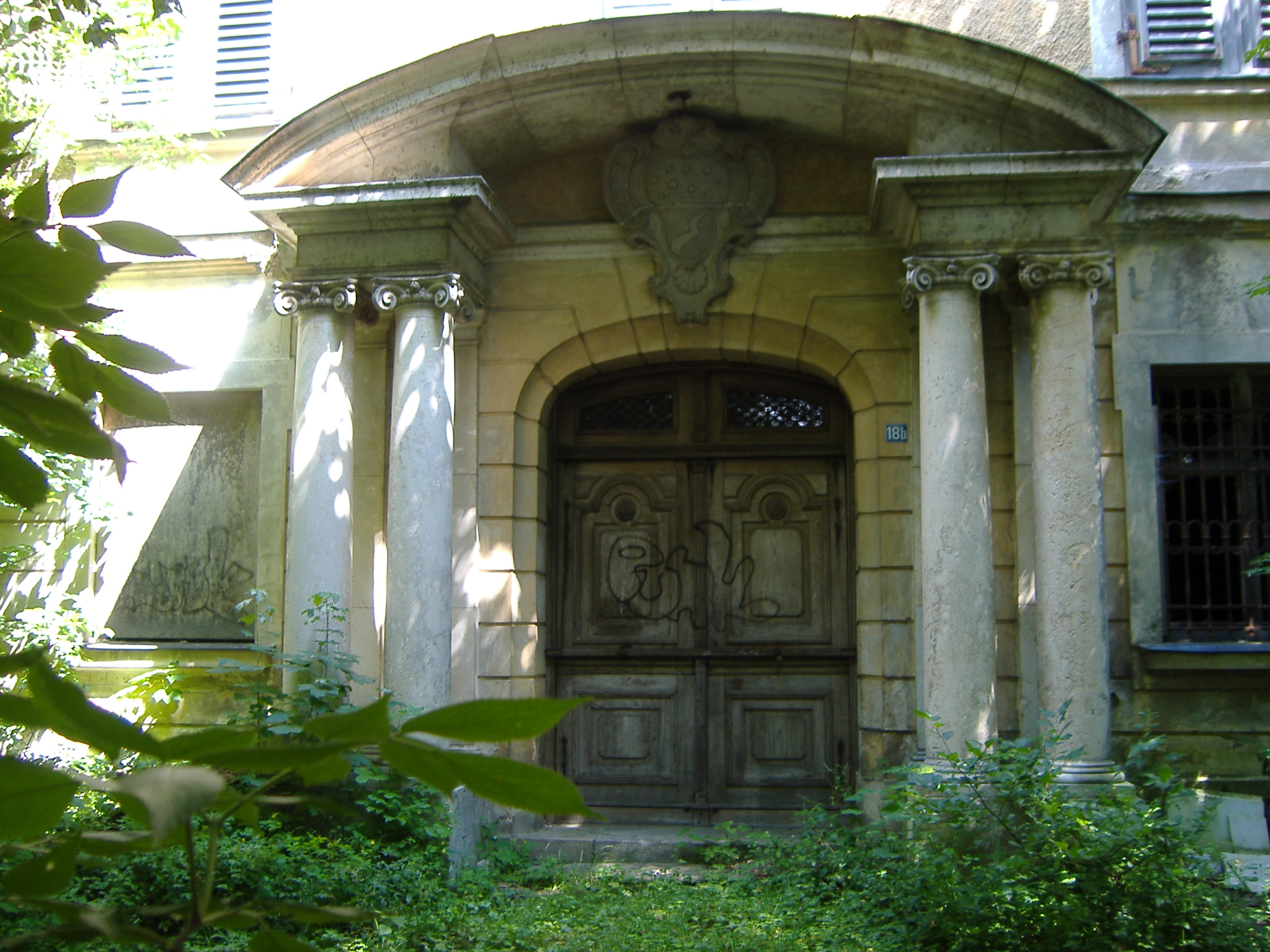 Schlossportal Schloss Unterbaar